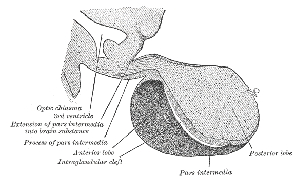 Pituitary gland